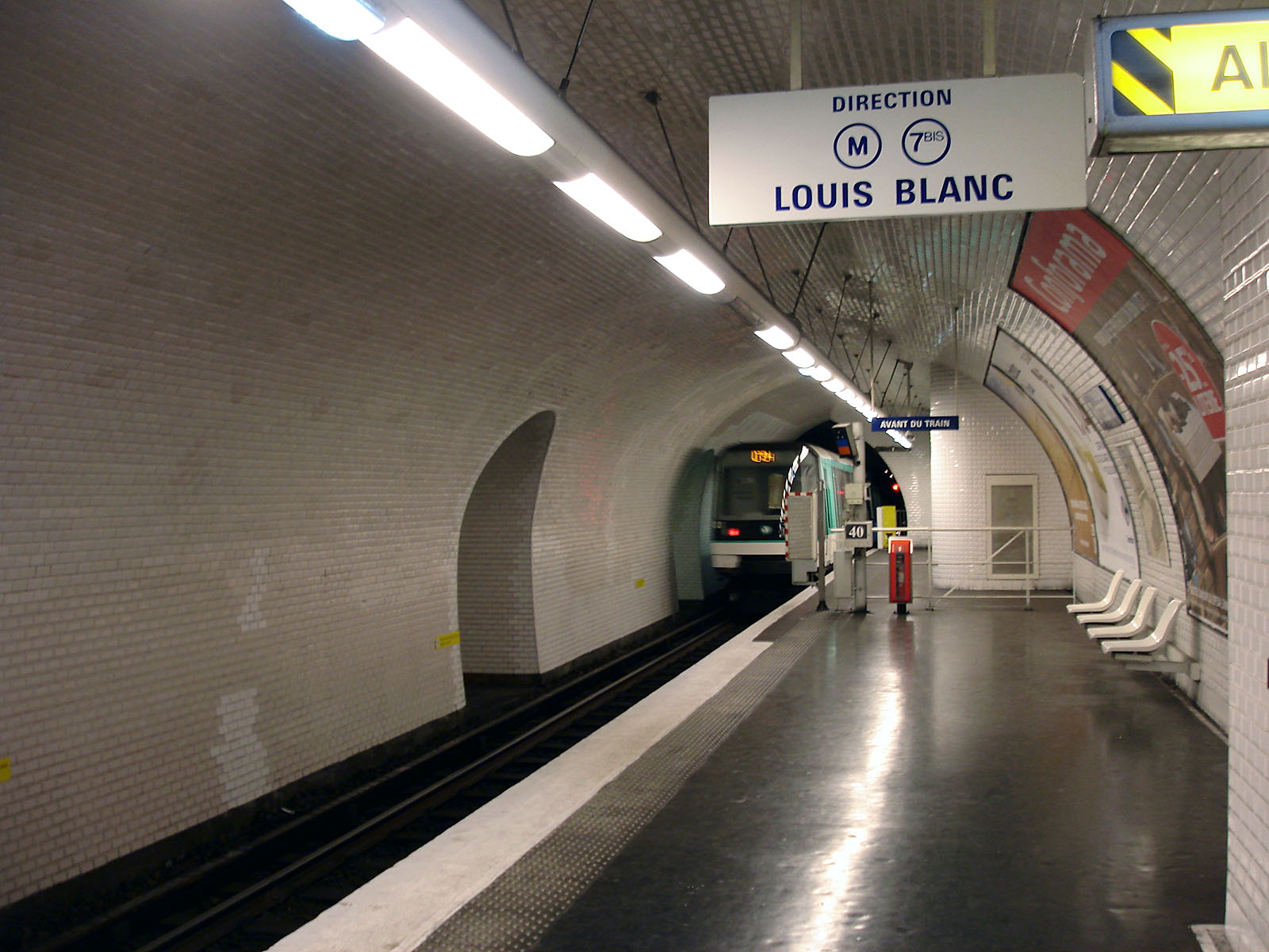 Station Botzaris de la ligne 7 bis du métro de Paris, France.